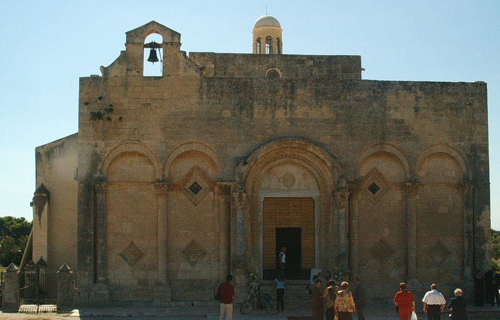 La Basilica si Siponto (Manfredonia) Foto di Marcello Castigliego